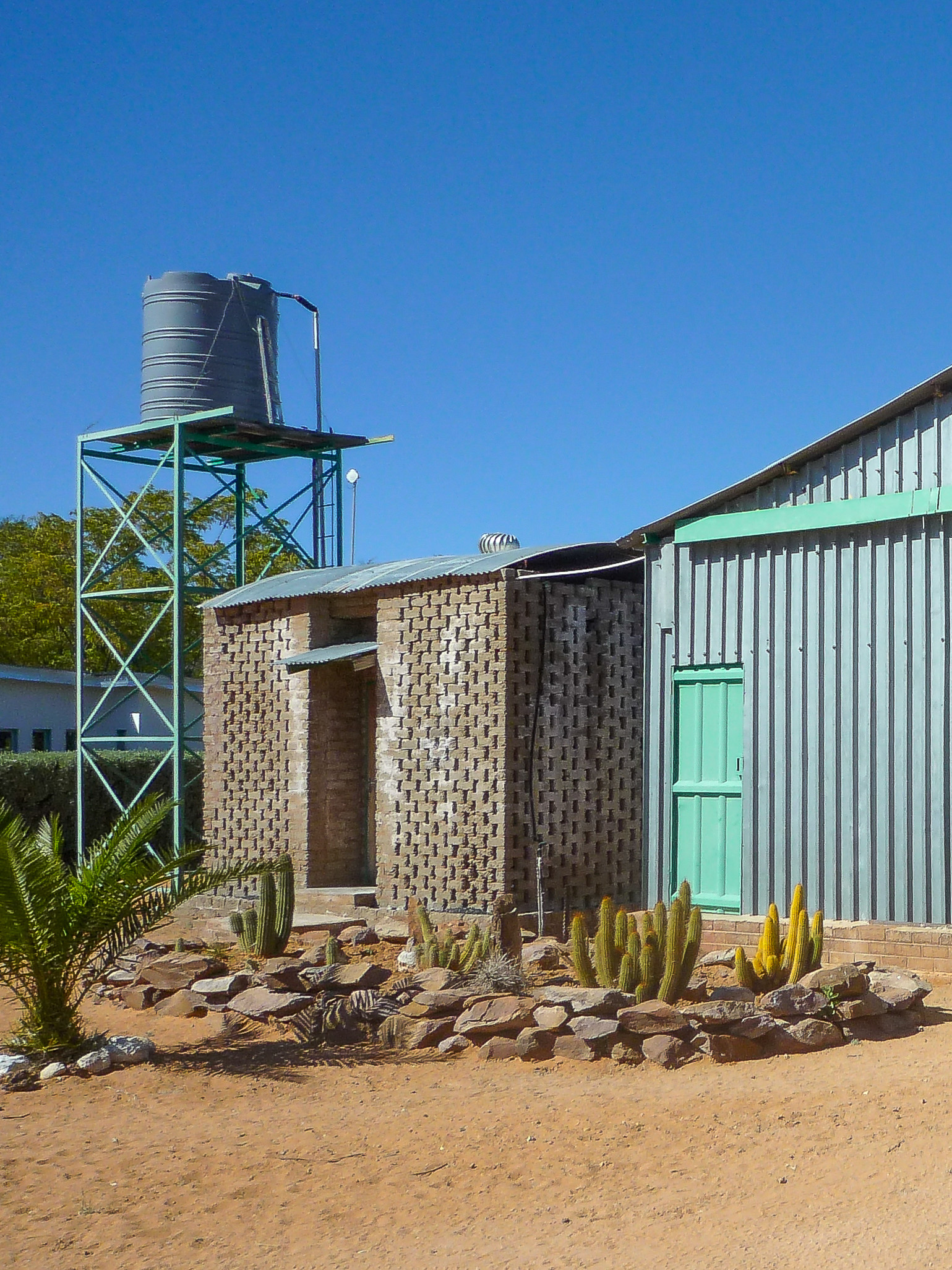 Kühlhaus auf "Rust Mijn Ziel" (Namibia)